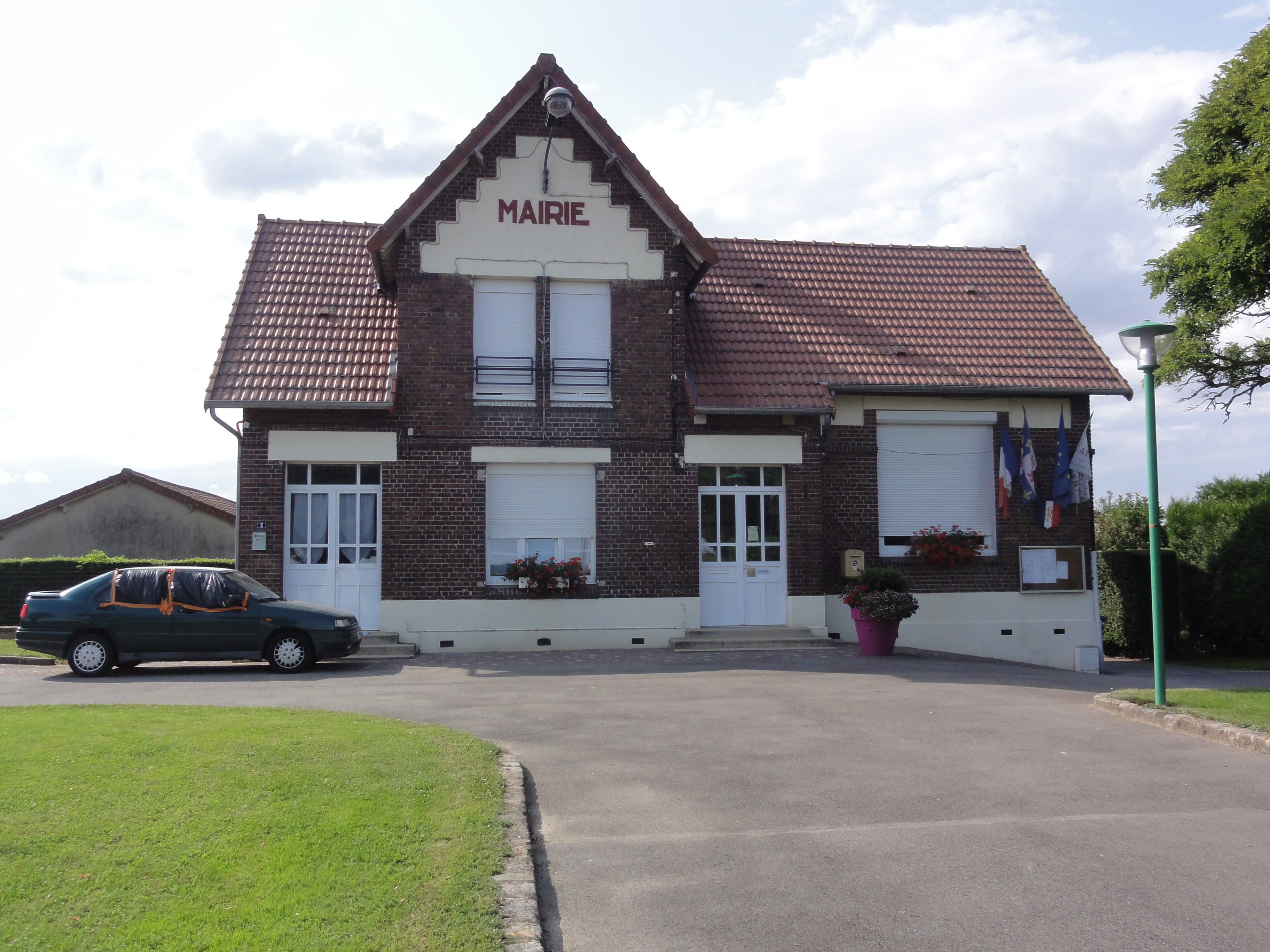 Contescourt (Aisne) mairie